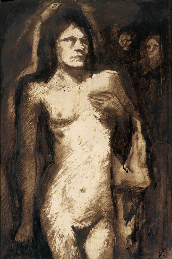 Sepia sur papier, 1945